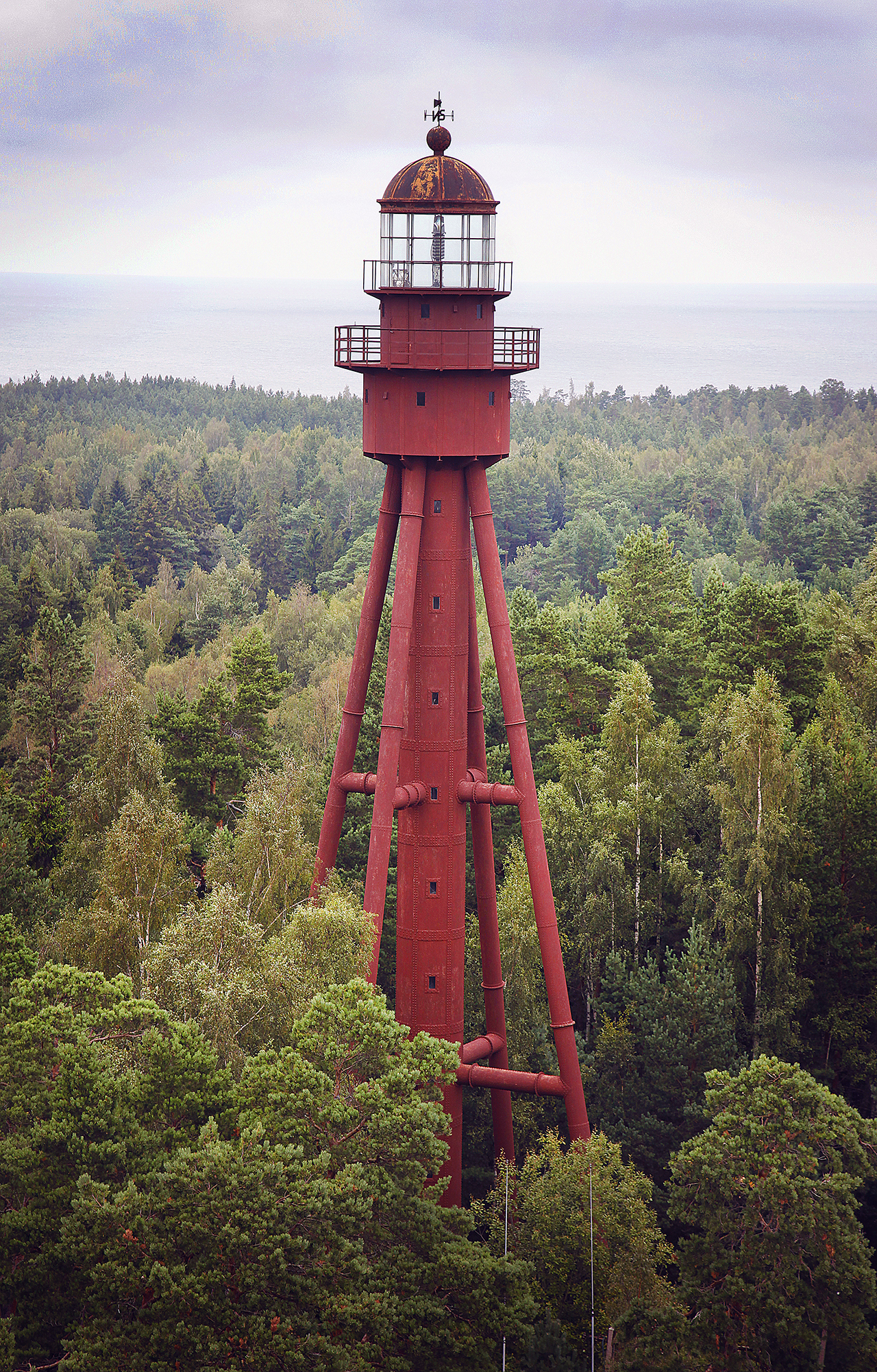 Ruhnu tuletorn 12